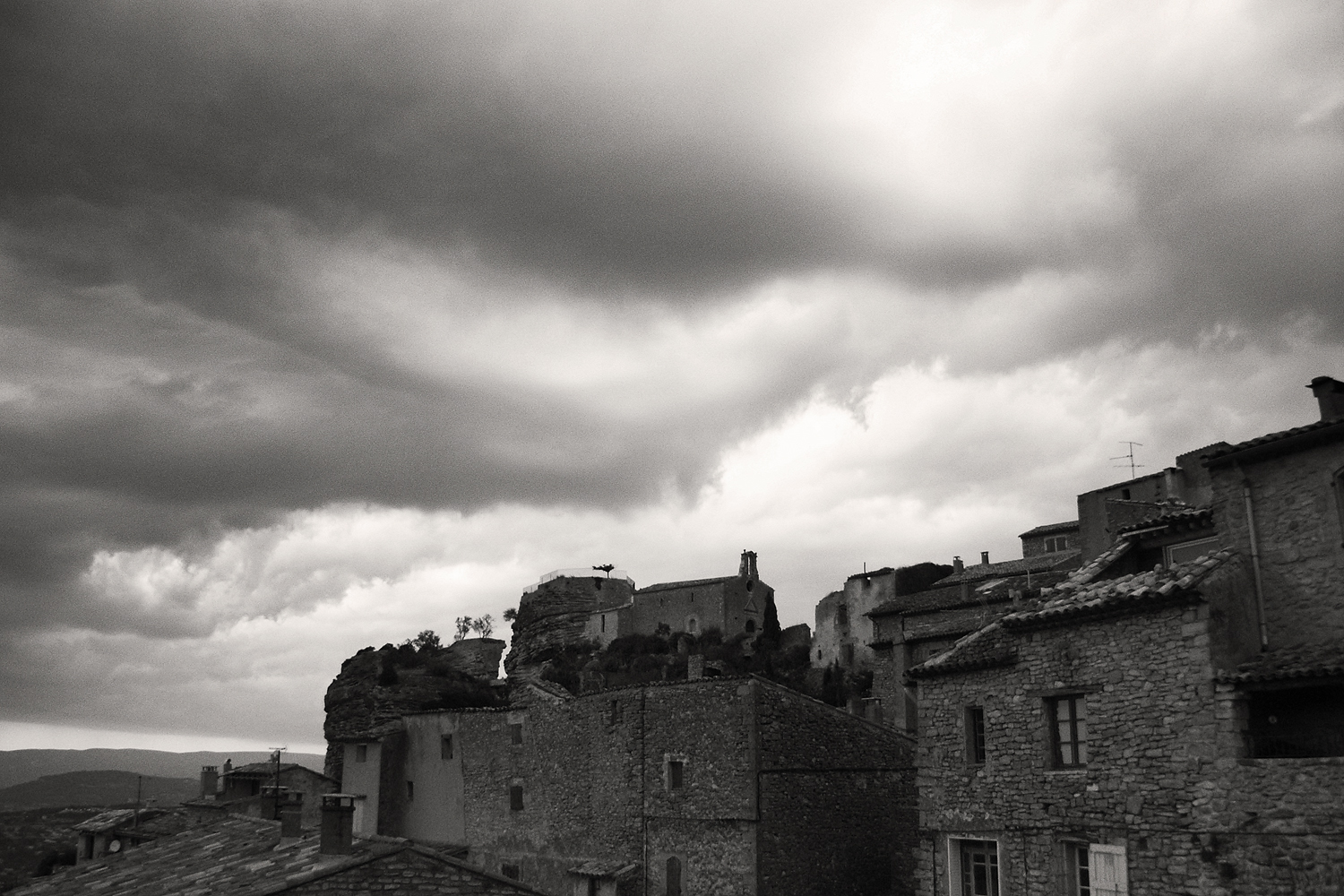 Nuages d'orage sur Saignon, dans le Luberon, exemple d'un "épisode méditerranéen"